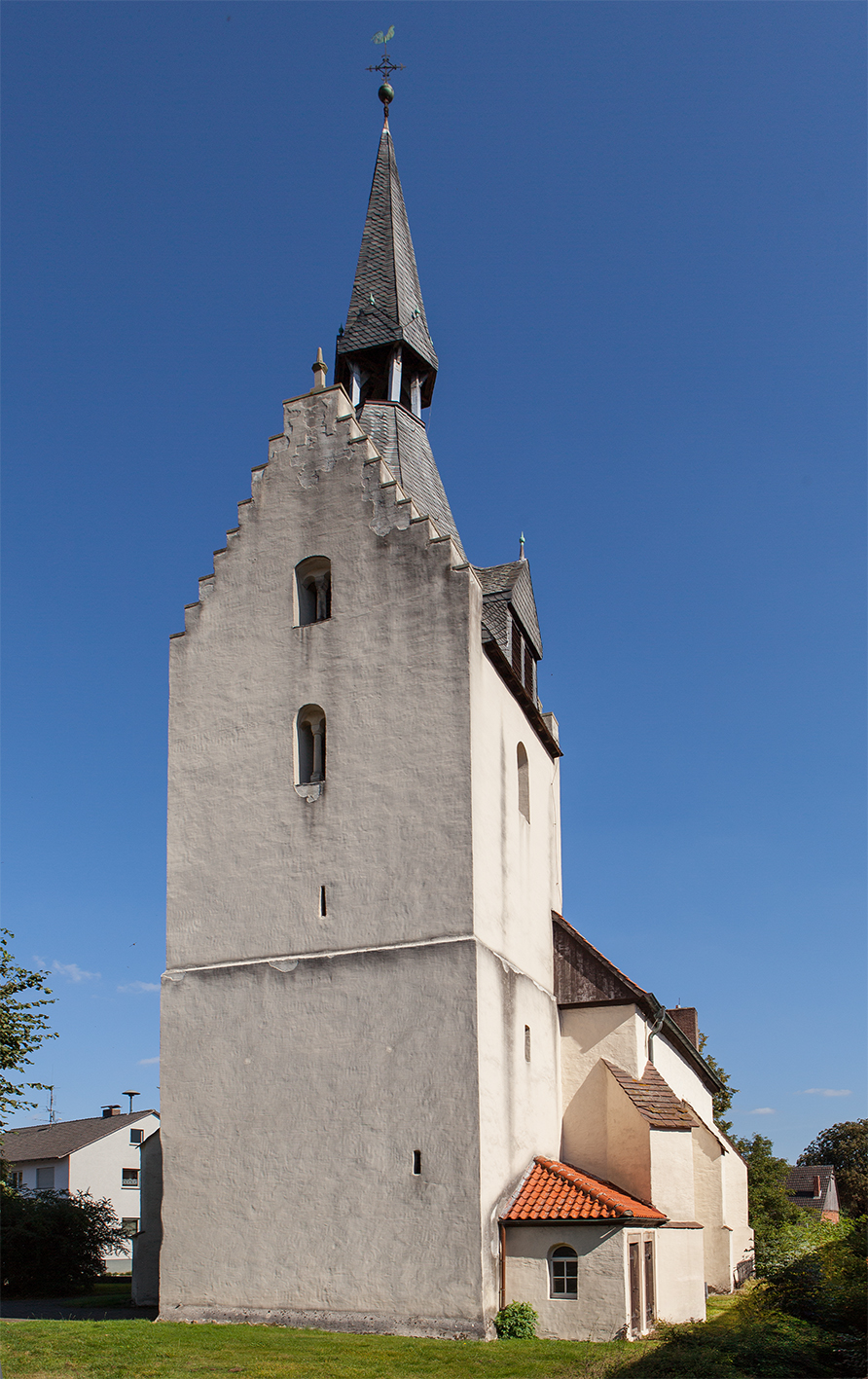 Evangelische Kirche Wöbbel (Schieder-Schwalenberg) This is a photograph of an architectural monument.